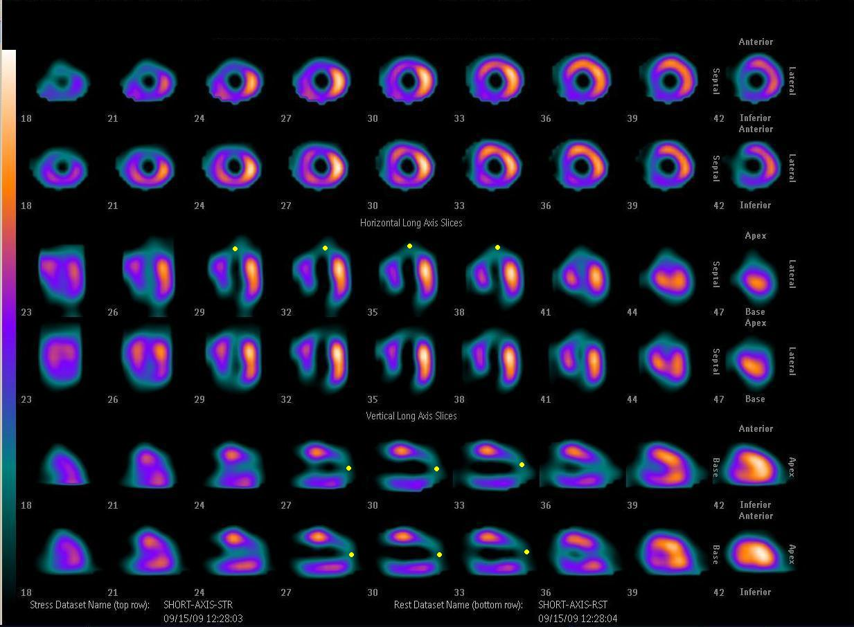 Defecto fijo de perfusion anterior y apical (areas señaladas con el punto amarillo), que corresponde a infarto antiguo.